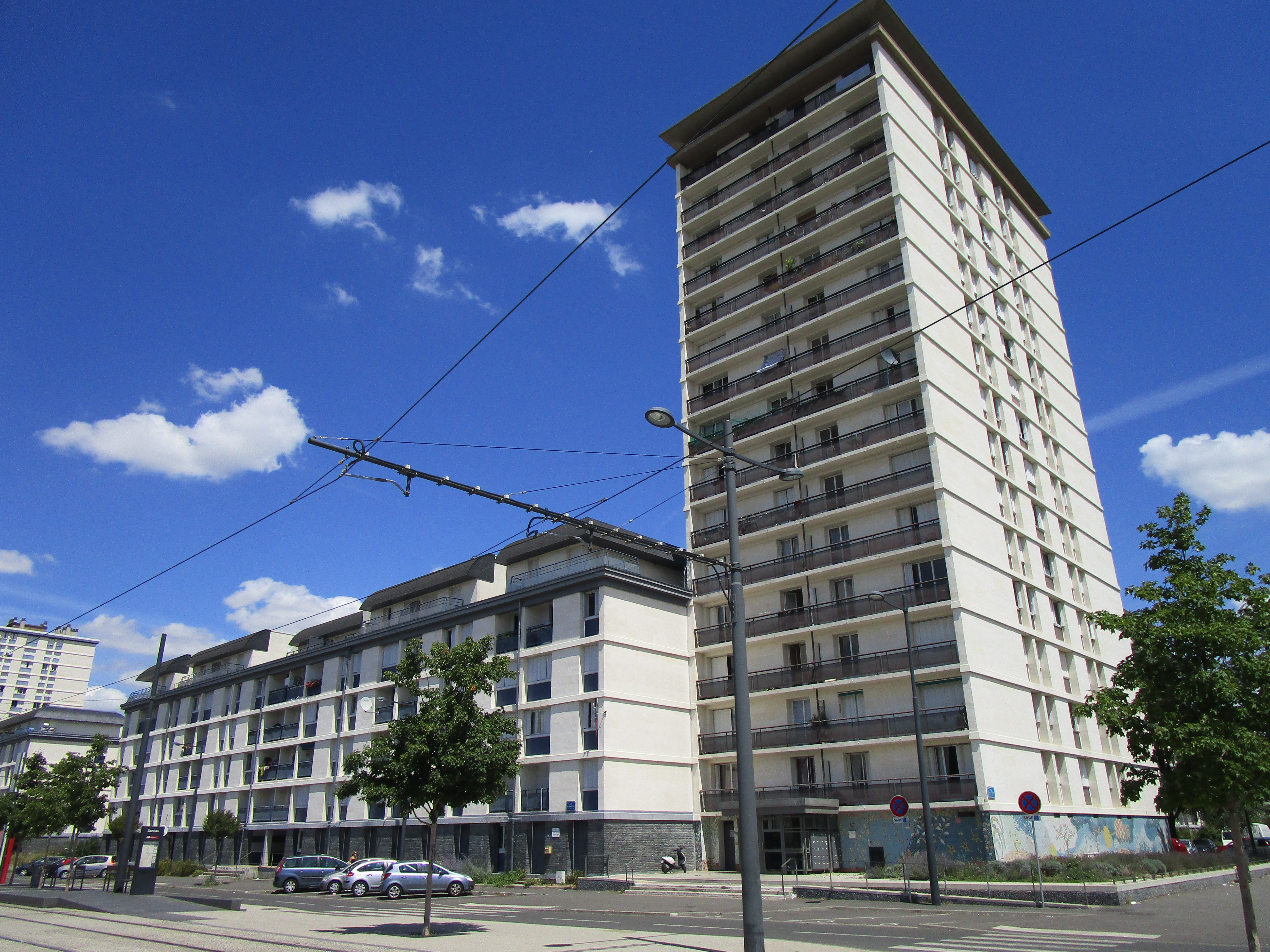 Vue d'une partie du lot des 811 dans le quartier du Sanitas, à Tours, sur l'allée Montrésor.